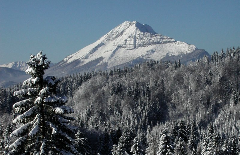 Der "Ötscher" in Niederösterreich, vom Schigebiet Annaberg aus gesehen